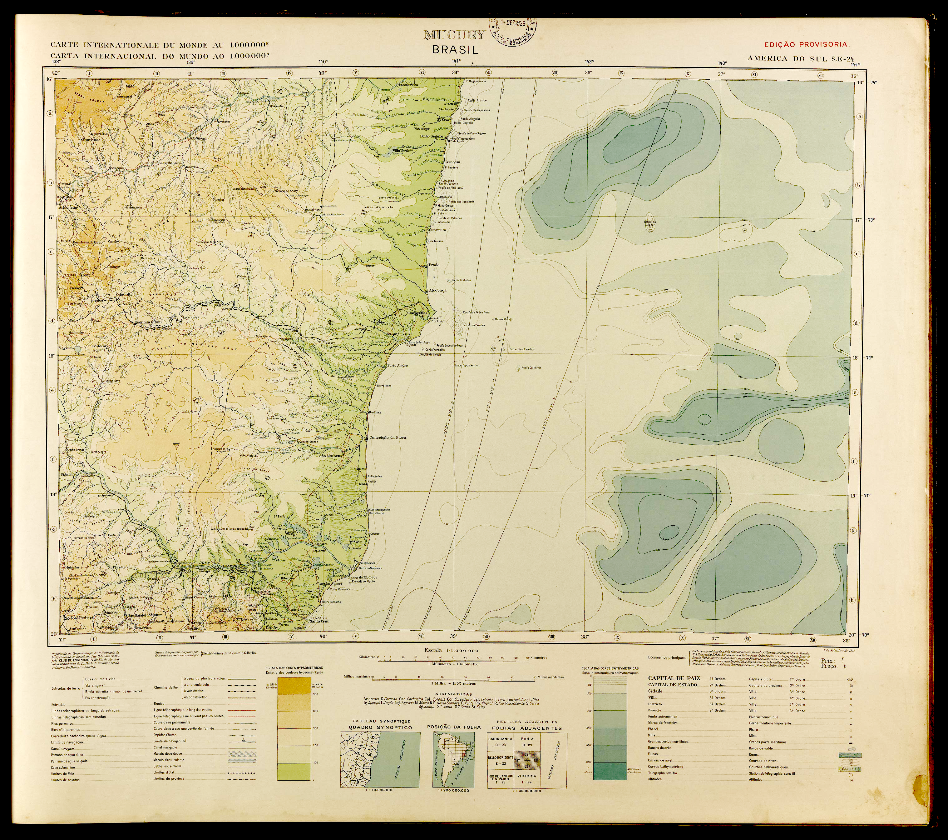 Uma das 50 folhas que compõem a Carta Geográfica do Brasil, publicada pelo Clube de Engenharia em 1922.